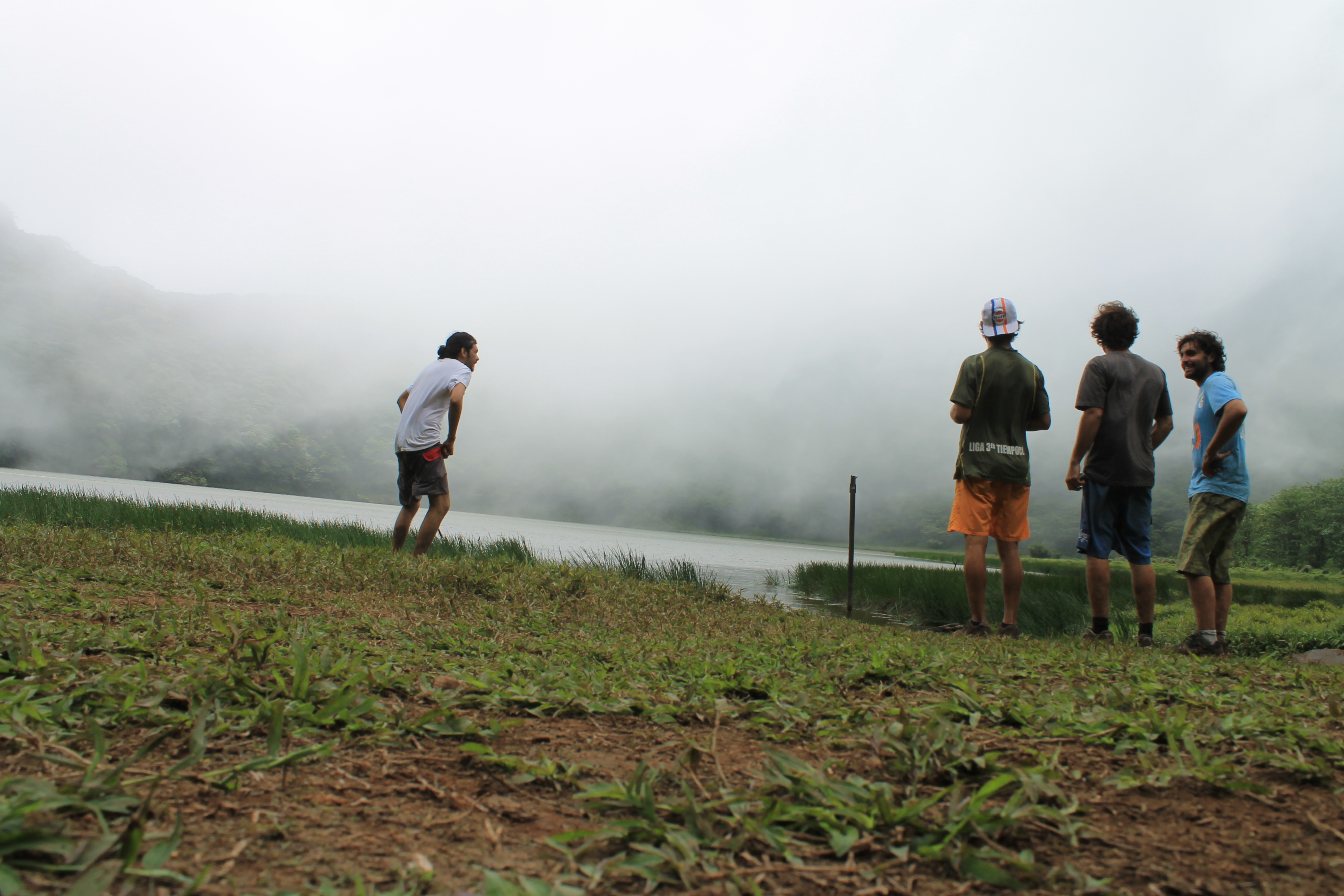 Turistas en la Laguna del Volcan Maderas, Isla de Ometepe.